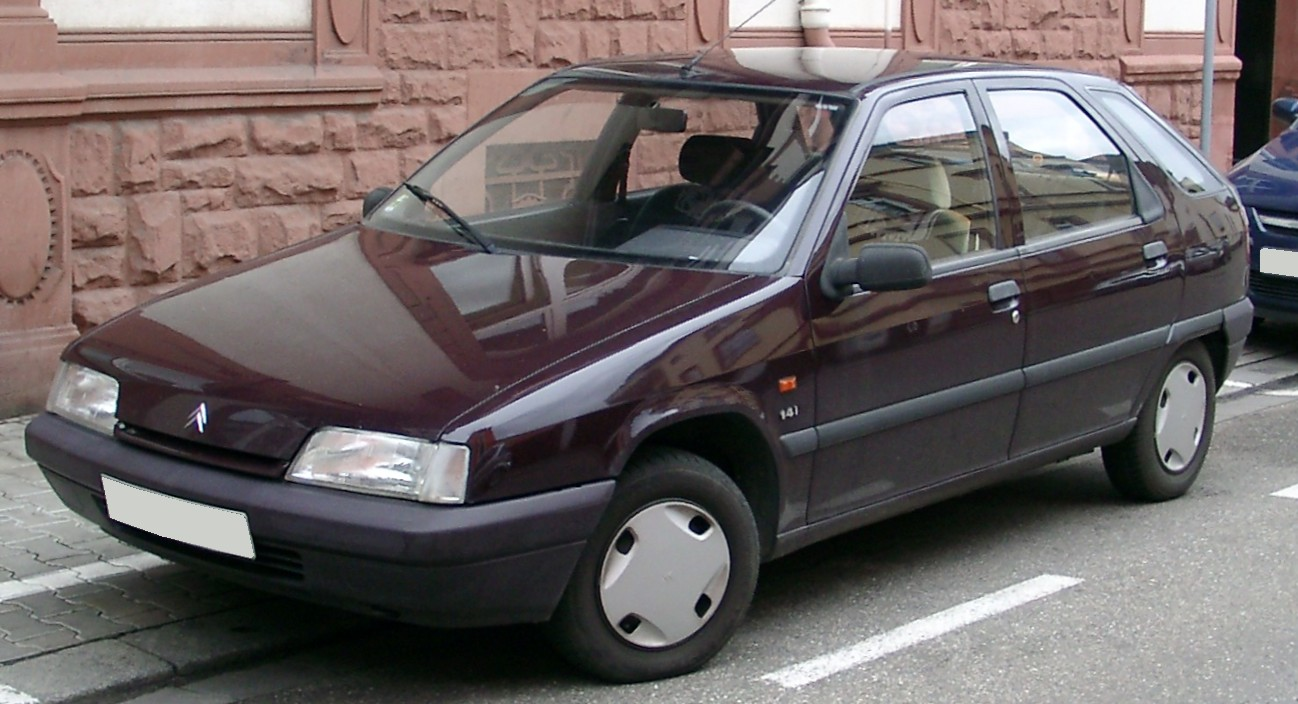 Citroën ZX